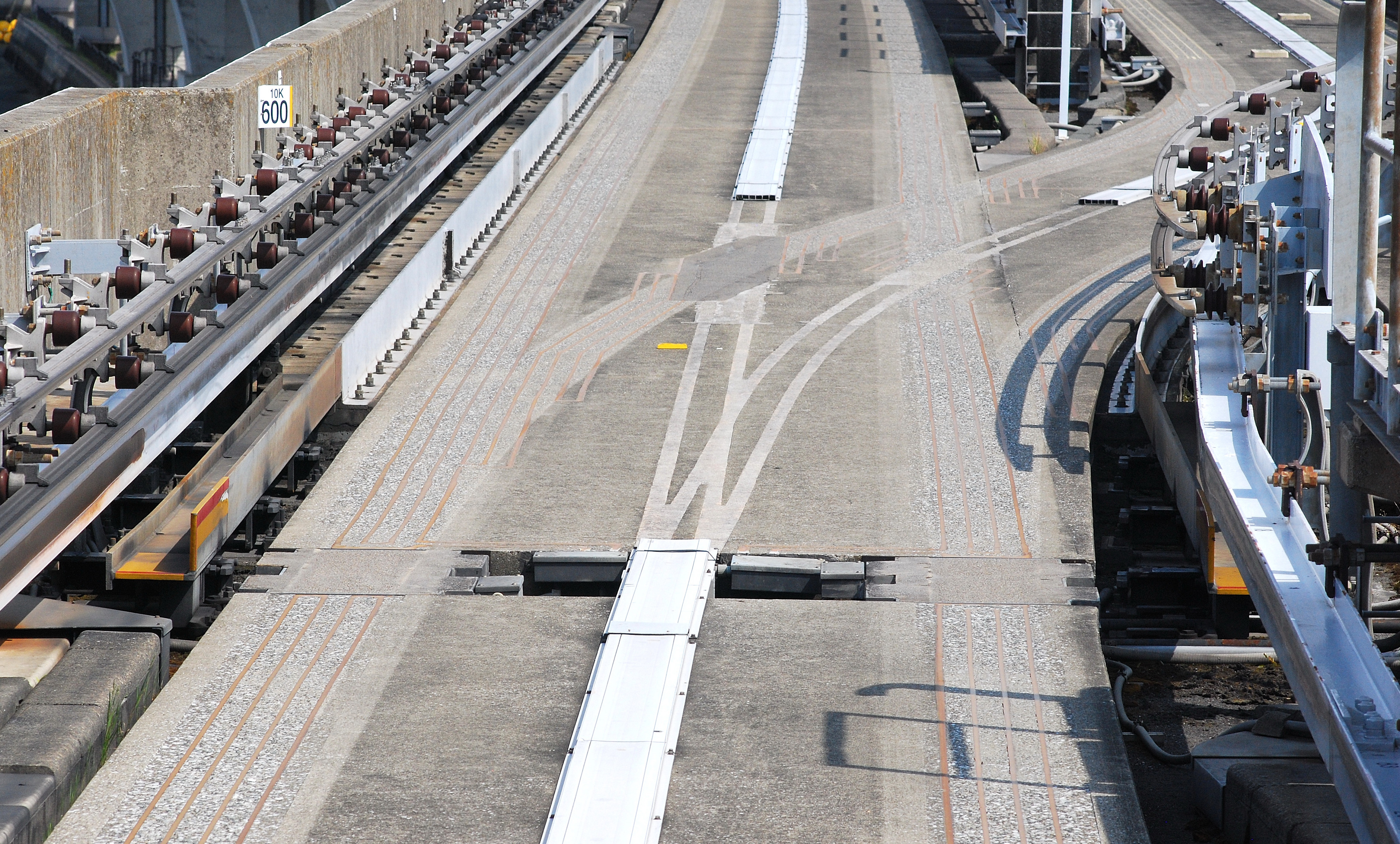 横浜新都市交通金沢シーサイドラインの分岐部分（車内から撮影）